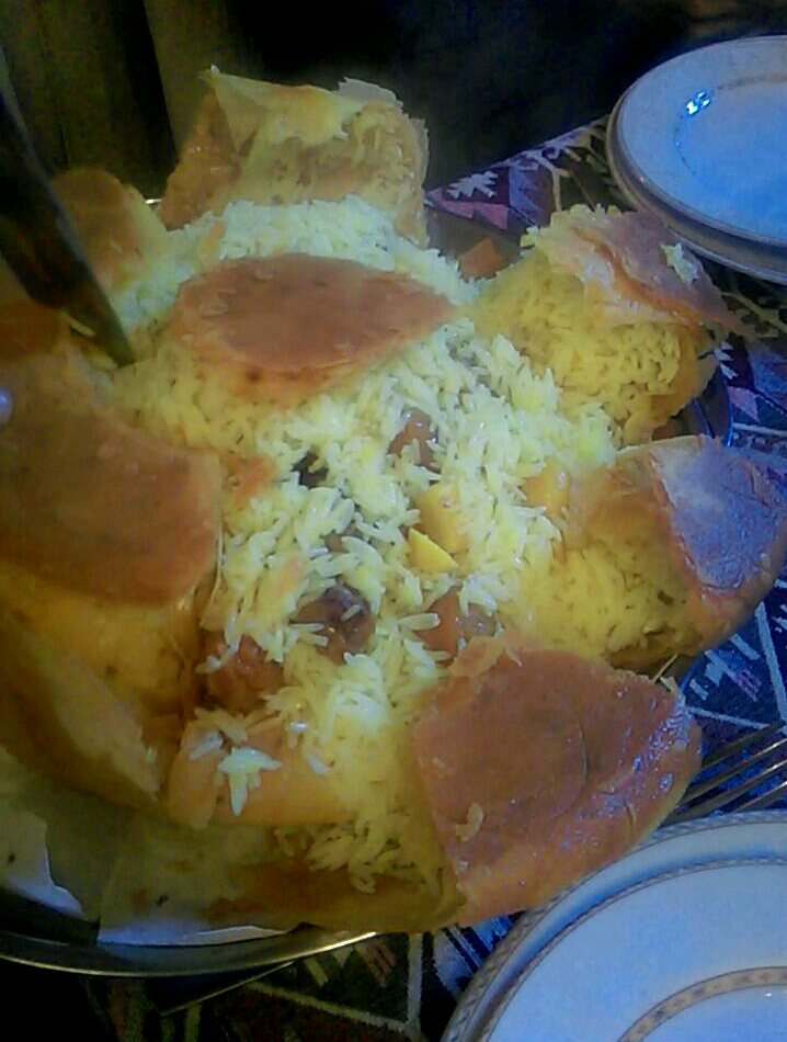 Şah plov Milli mətbəx